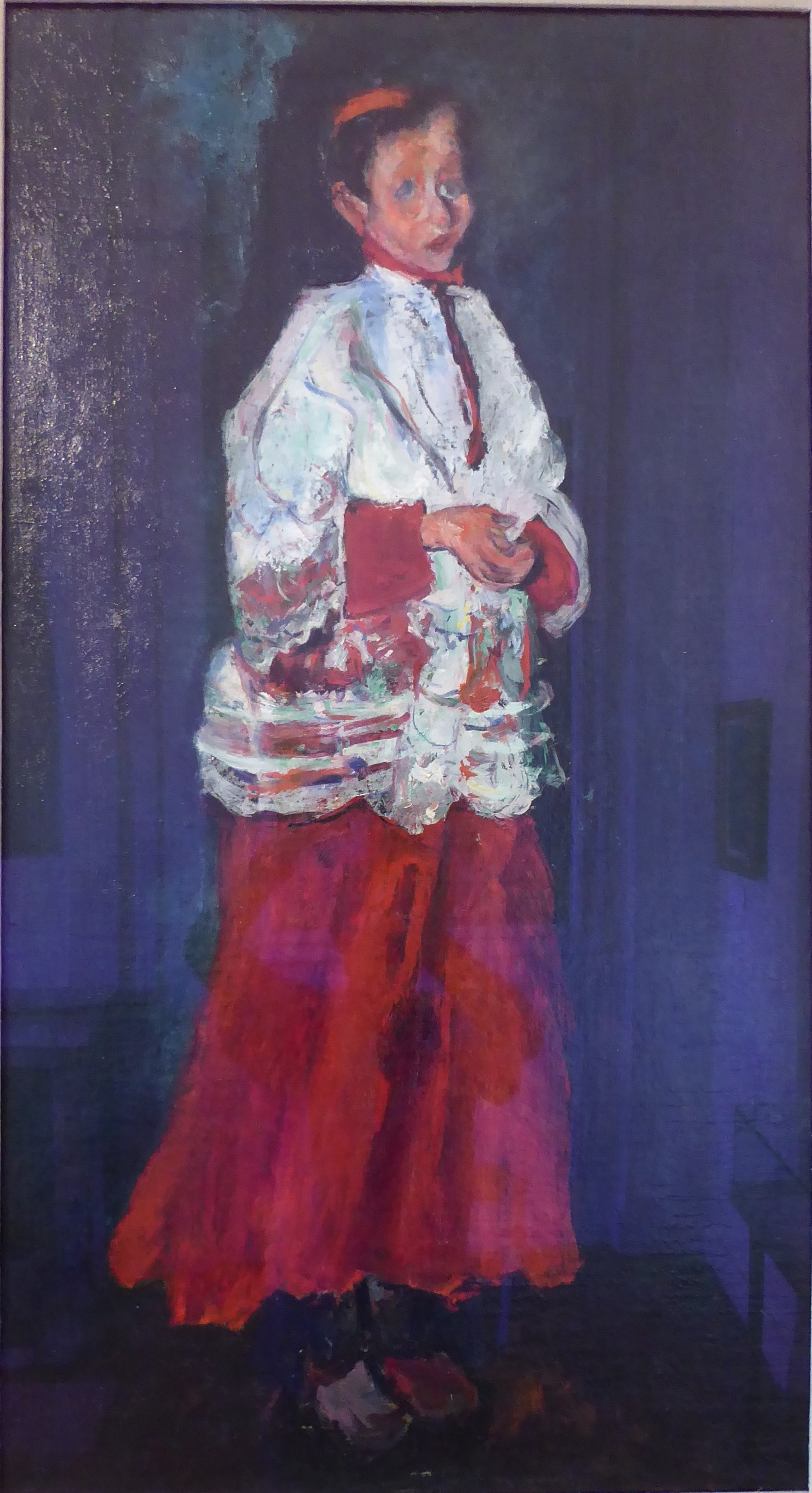 le grand enfant de chœur par Soutine (1925), musée des Beaux-Arts de Chartres, Eure-et-Loir, France.